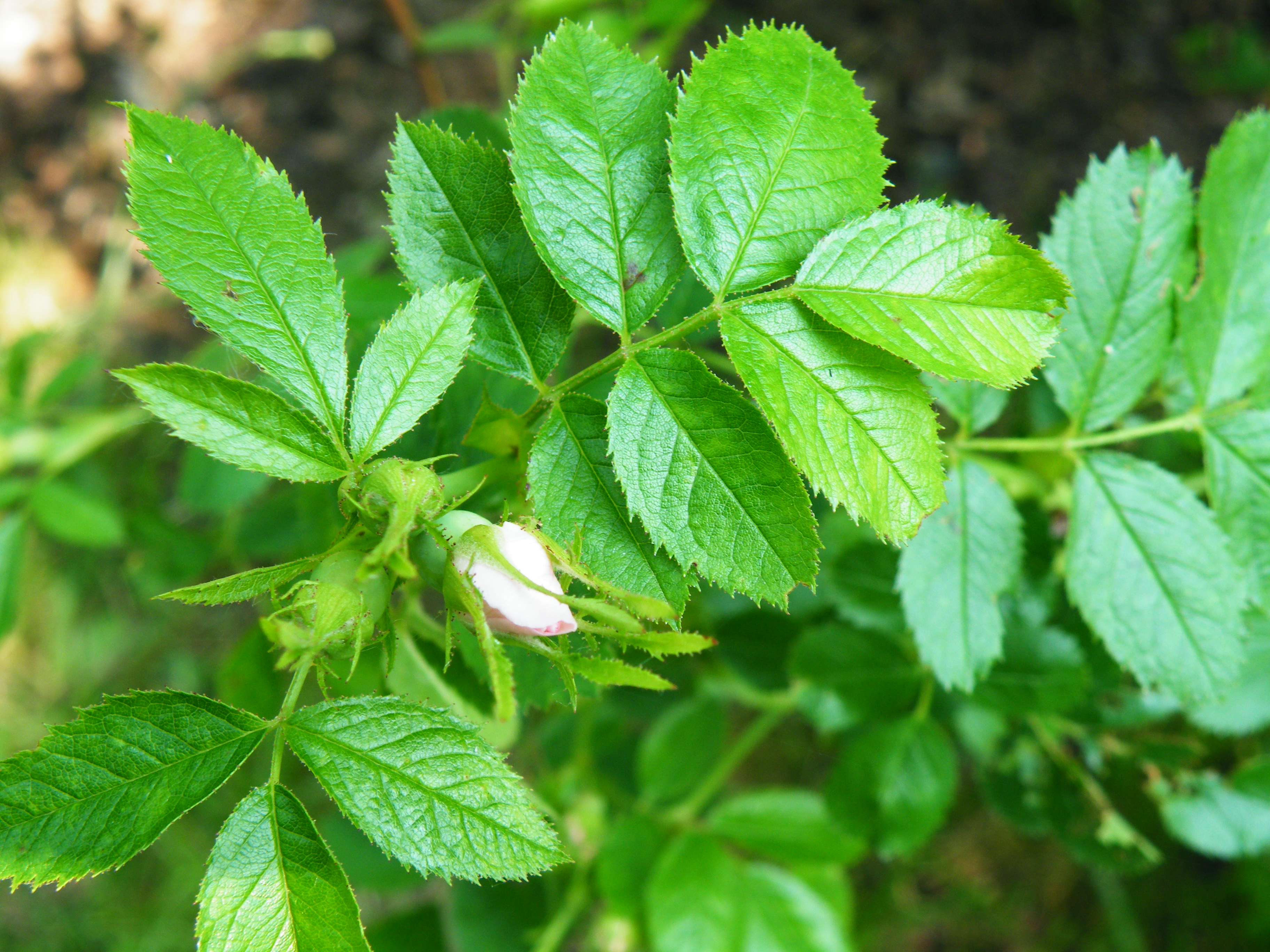 Róża eliptyczna